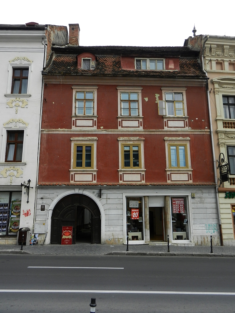 Casa monument istoric (Piata Sfatului 22)